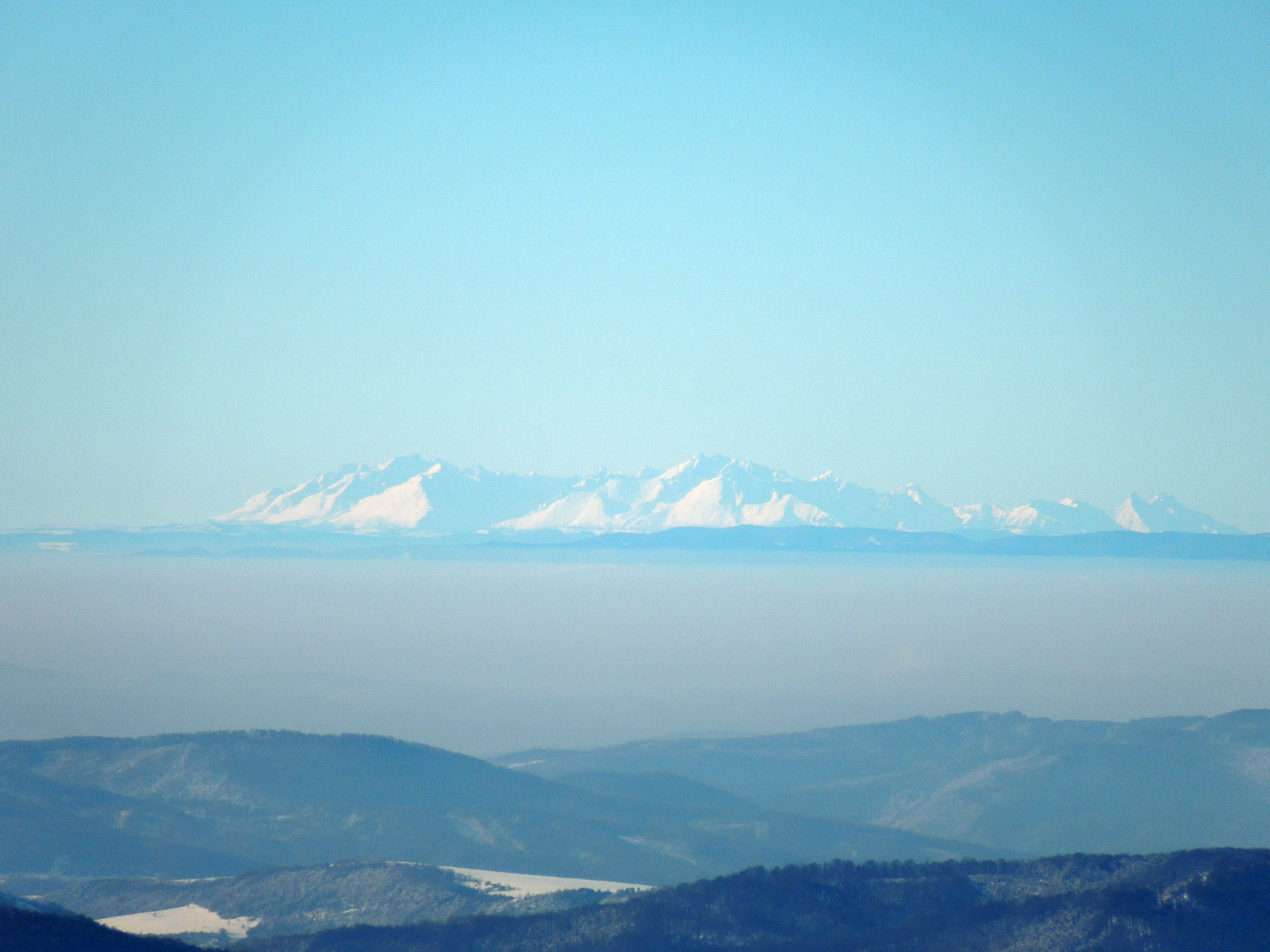 Pohľad na Vysoké Tatry z vrcholu Ďurkovca